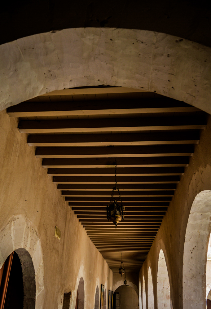 Plafond dans la fondouk El Haddadine à Sfax (Tunisie)